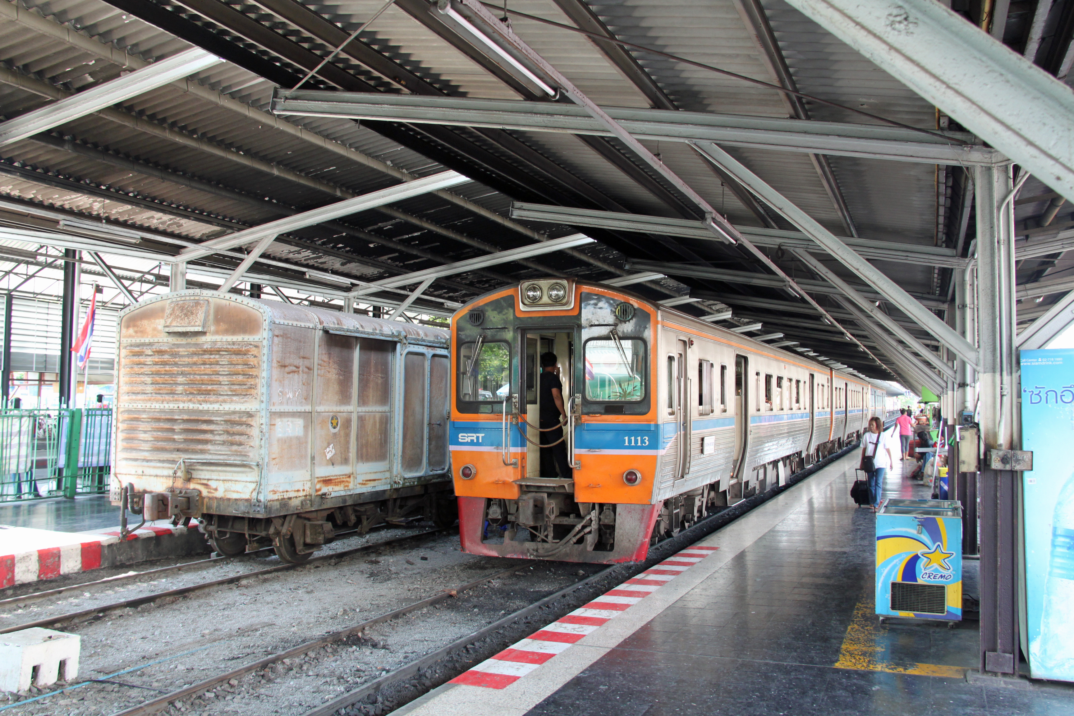 Carriage of Thailand State Railways